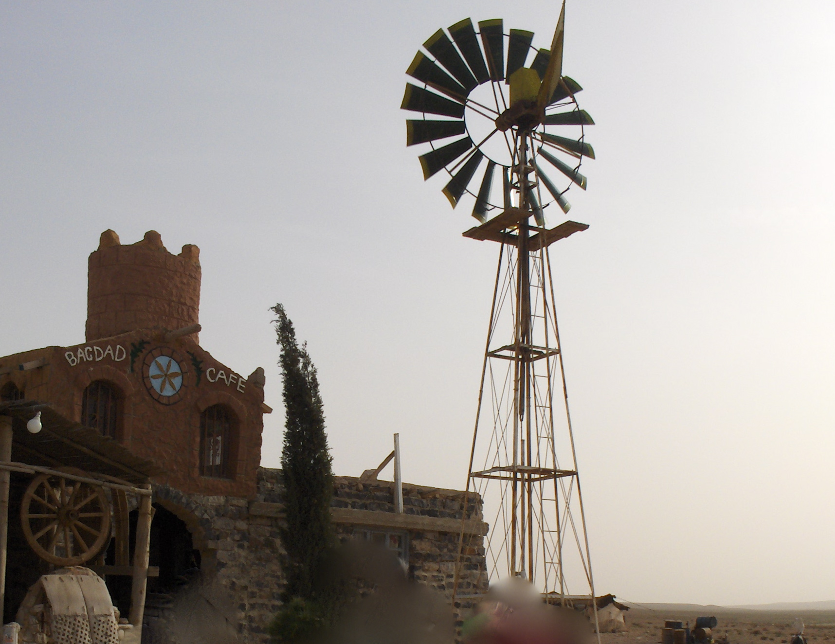 Pompa eolica del Bagdad Cafe, sulla strada Damasco - Palmira